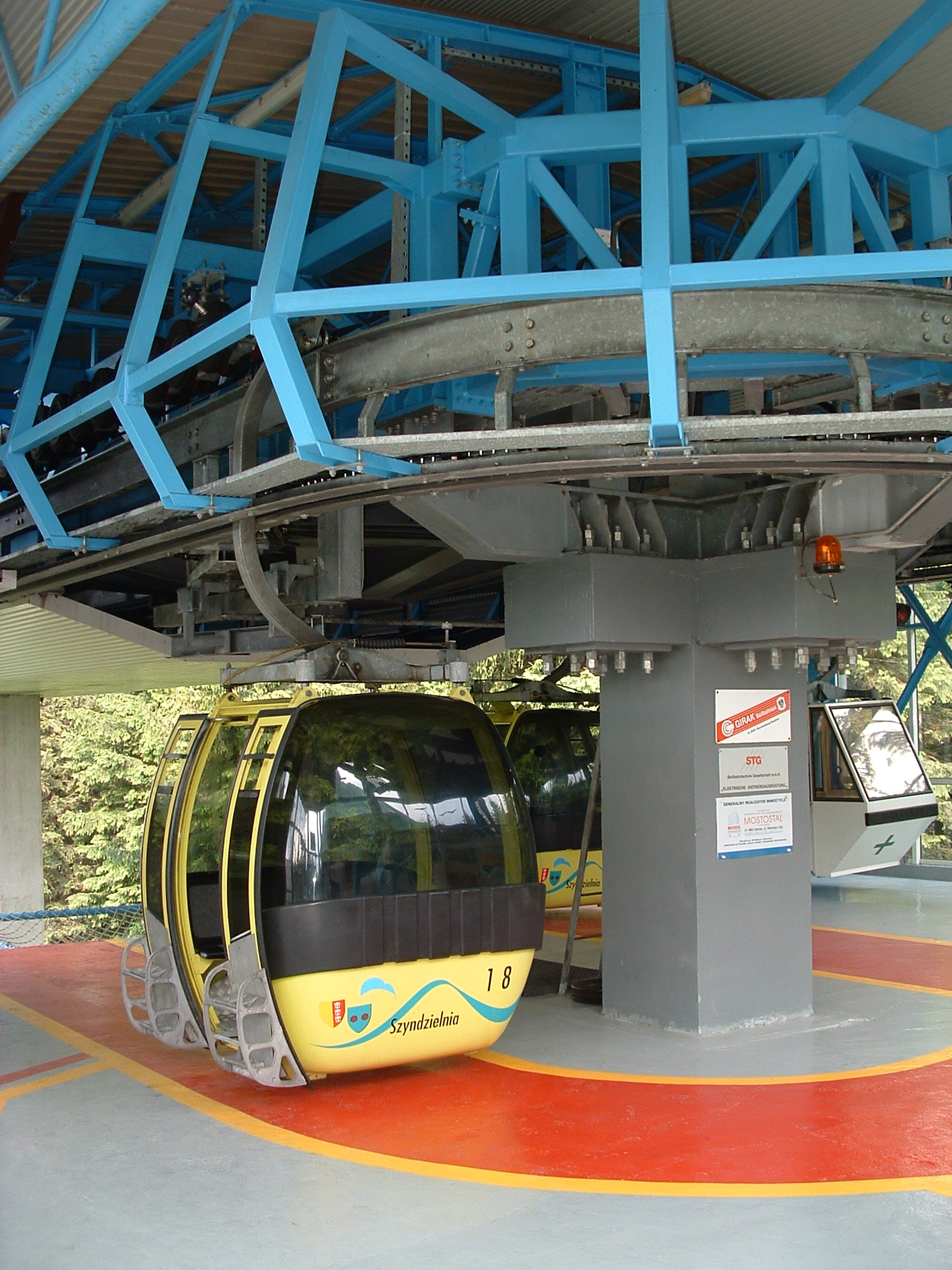 Górna stacja kolejki gondolowej na Szyndzielnię